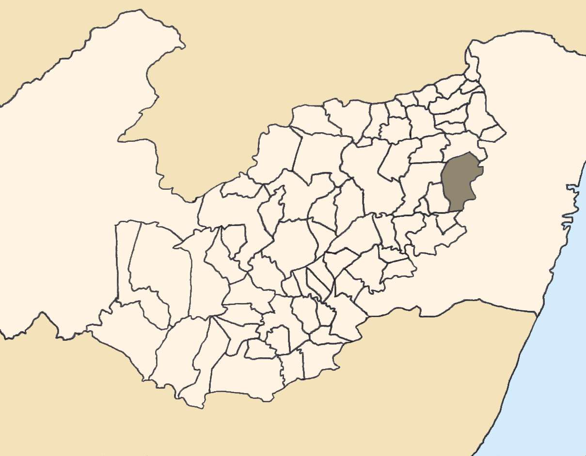 Mapa da mesorregião Agreste de Pernambuco (Brasil) subdivida em municípios. Em destaque, o município de Gravatá. Map of the brazilian state of Pernambuco (mesorregião Agreste) showing the city of Gravatá. Imagem tratada com o GIMP. Image made with GIMP.